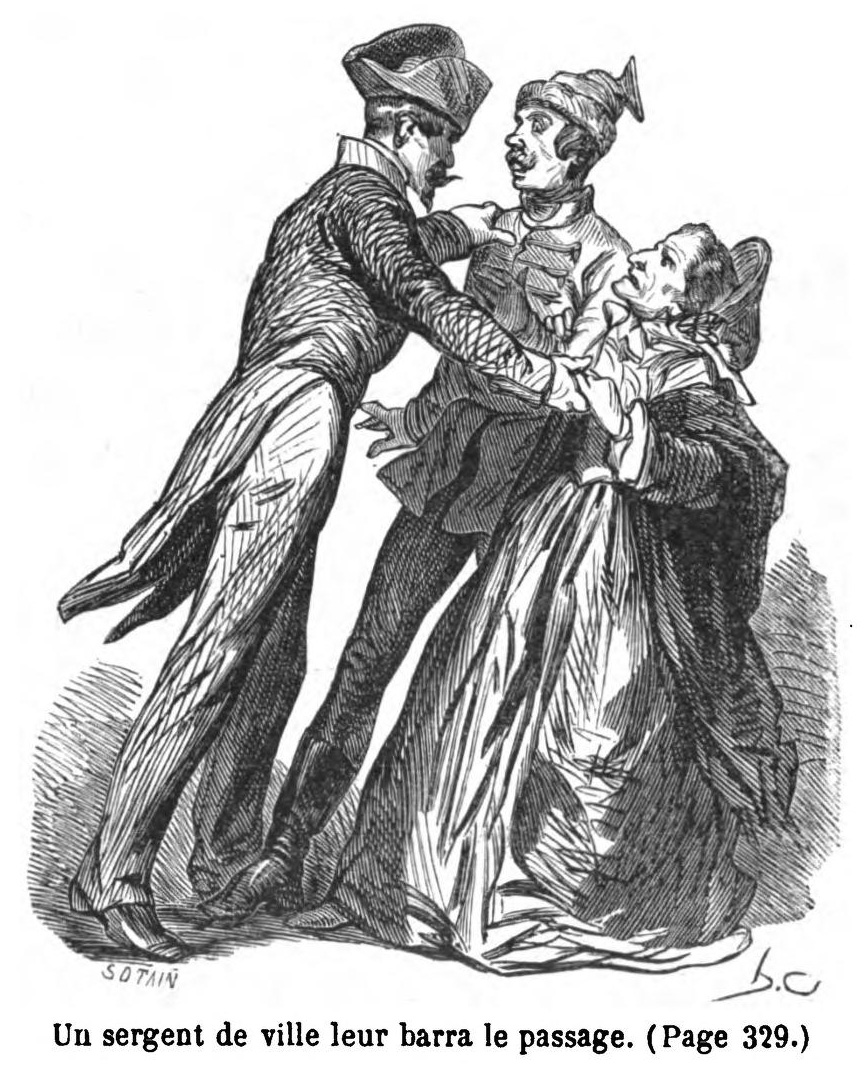 Comtesse de Ségur, Les Deux Nigauds, illustration d'Horace Castelli, 1863.